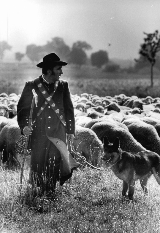 Schäfer mit Hund und Herde ADN-ZB Pätzold-31.7.86 Bez. Schwerin: Schäfer im Wettstreit- Bei dem Schweriner Bezirksmeisterschaften im Leistungshüten hatte Schäfermeister Rodolf Hirch mit seinen Hunden Dina und Tron seinen Vorjahrestitel zu verteidigen. Im Bezirk Schwerin soll der Schafbestand zum Jahresende mit 128.000 Tieren nahezu 10 % größer sein als zum gleichen Zeitpunkt des Vorjahres.